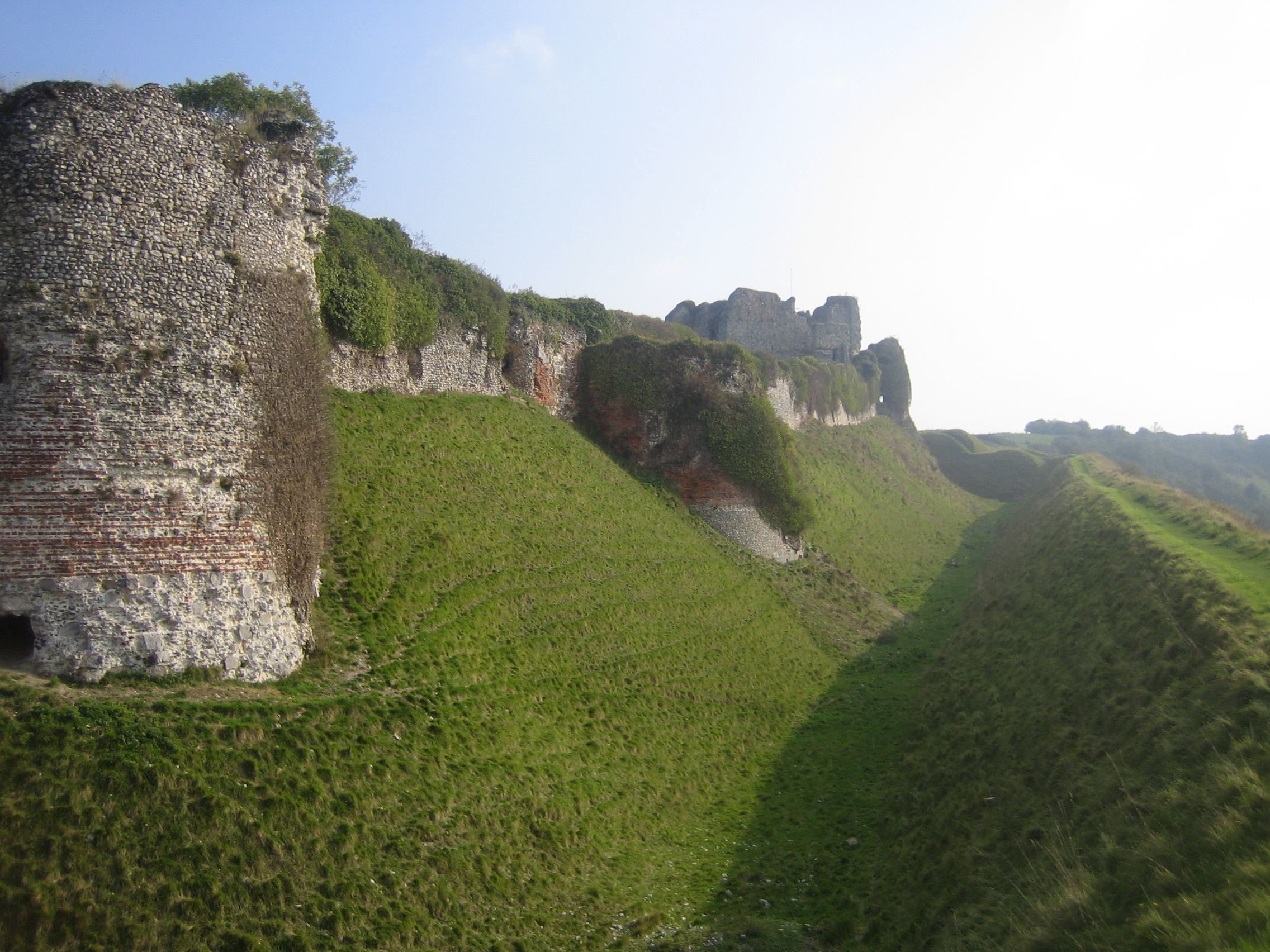 remparts sud-ouest